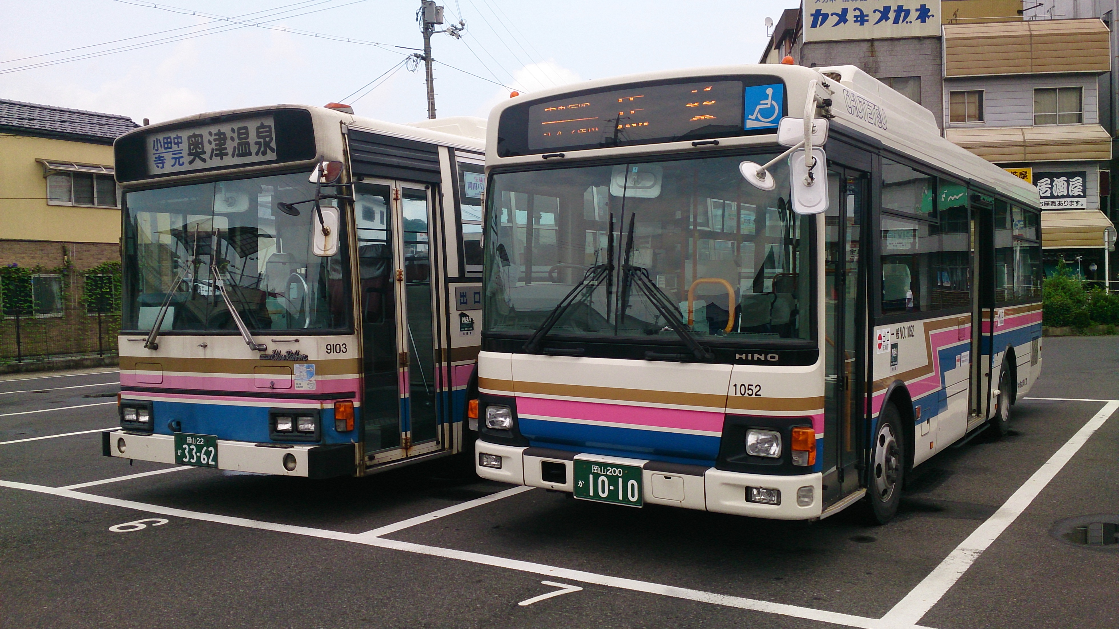 中鉄北部バスセンターにて撮影。社番は、右『1052』、左『9103』